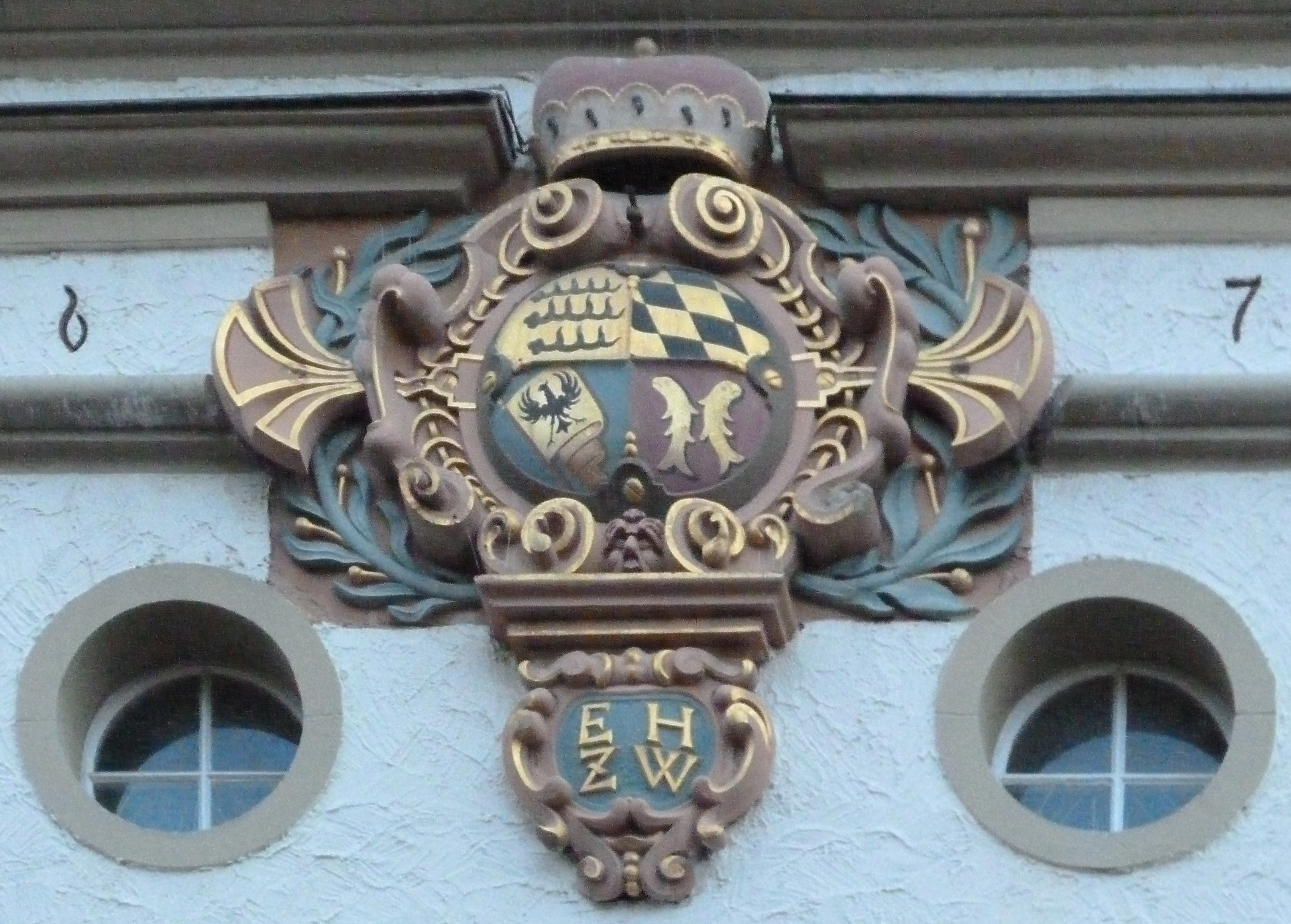 Wappen am Schloss Stetten.